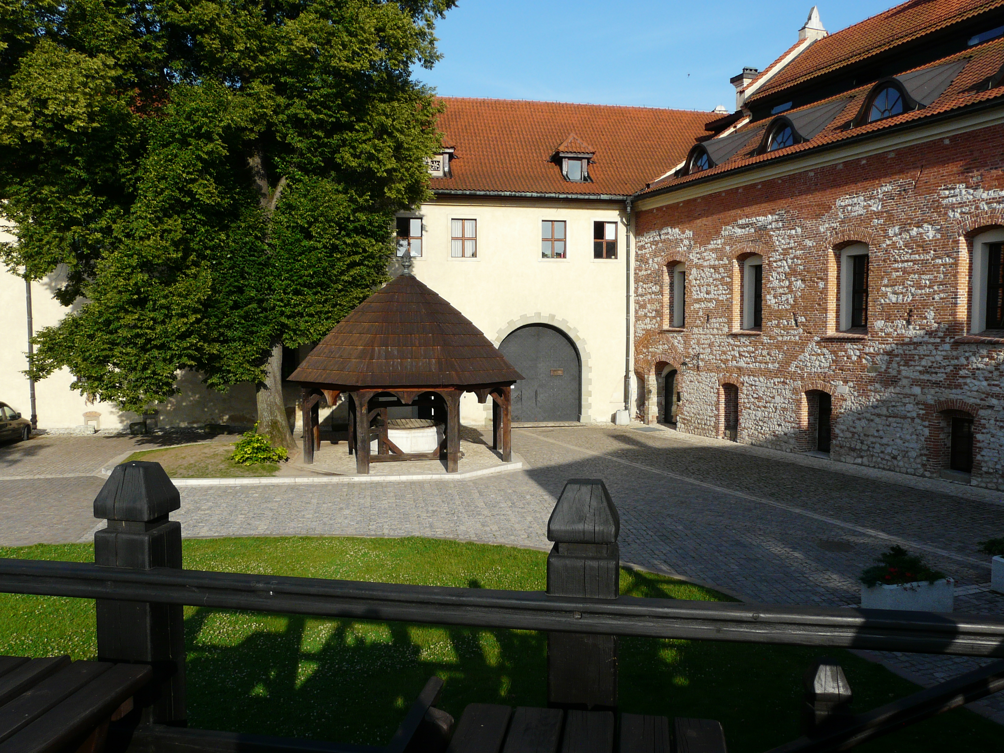 Tyniec Abbey